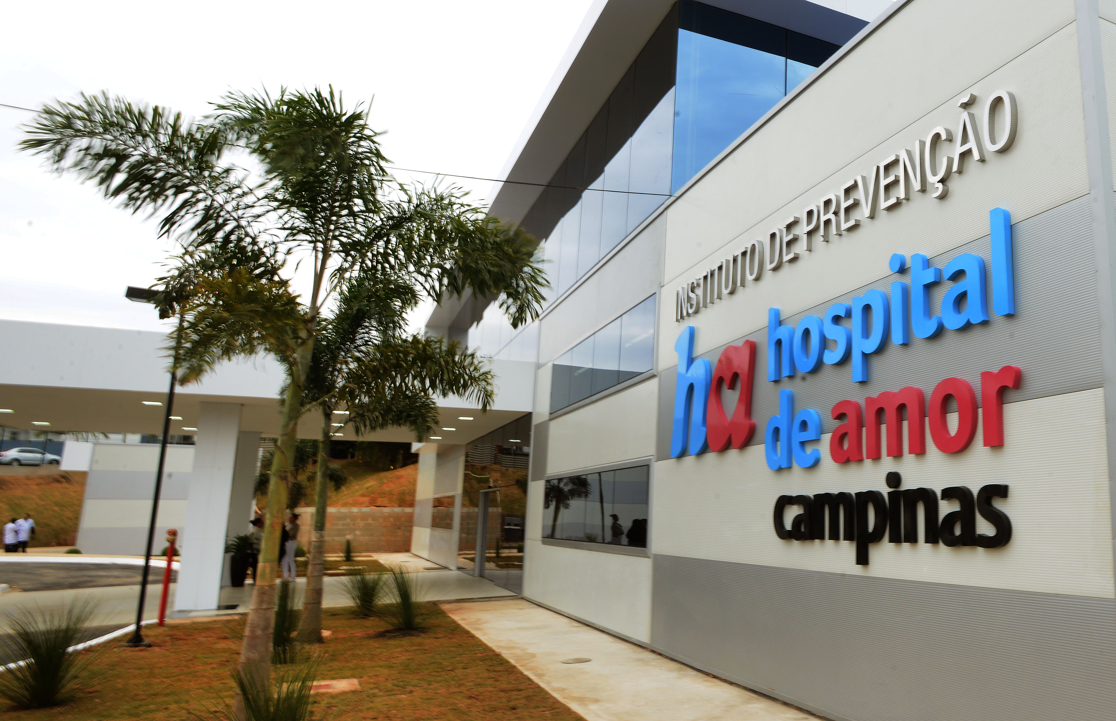 Inauguração Hospital de Amor Campinas Fotógrafa Carlos Bassan